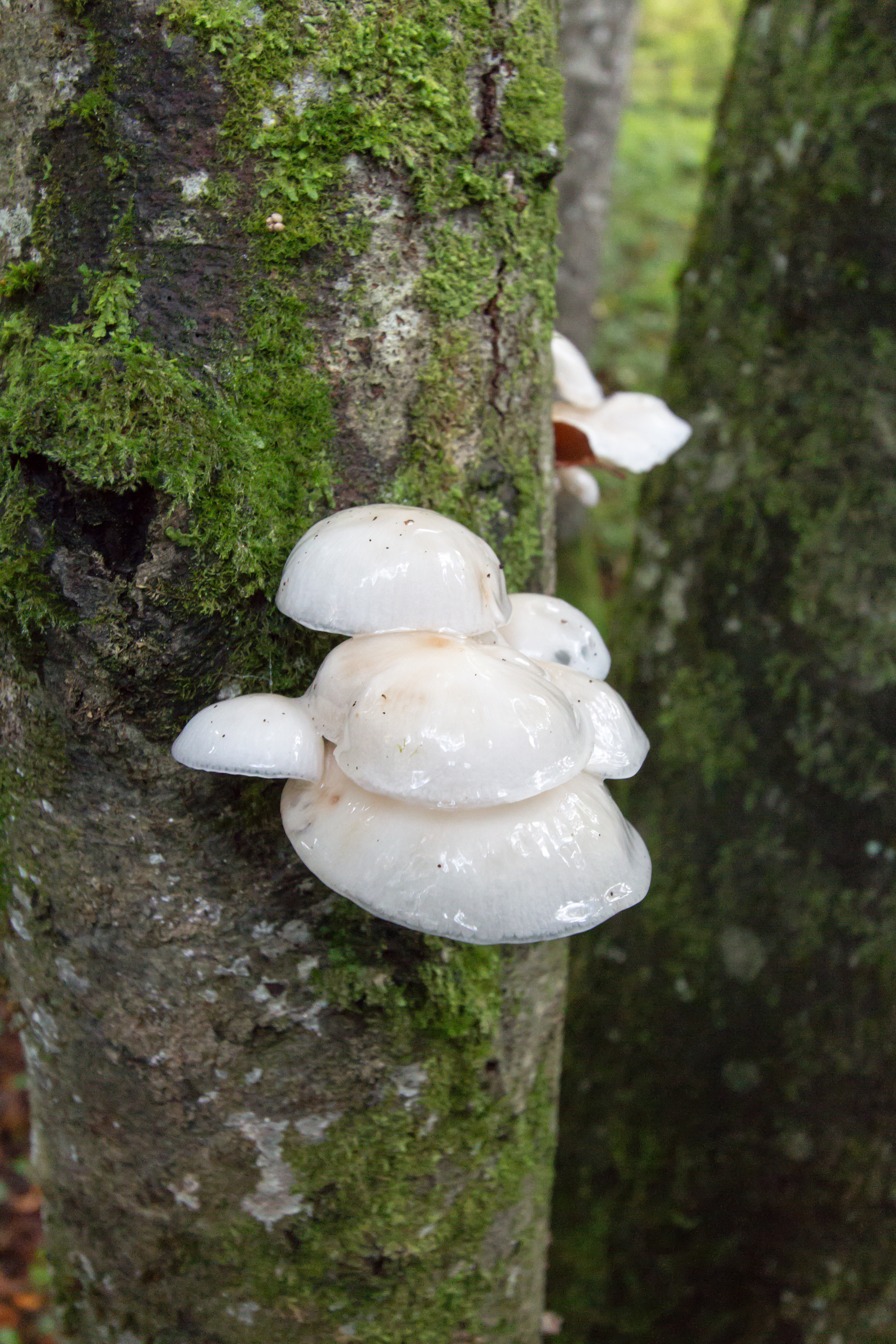 Buchen-Schleimrübling (Oudemansiella mucida)